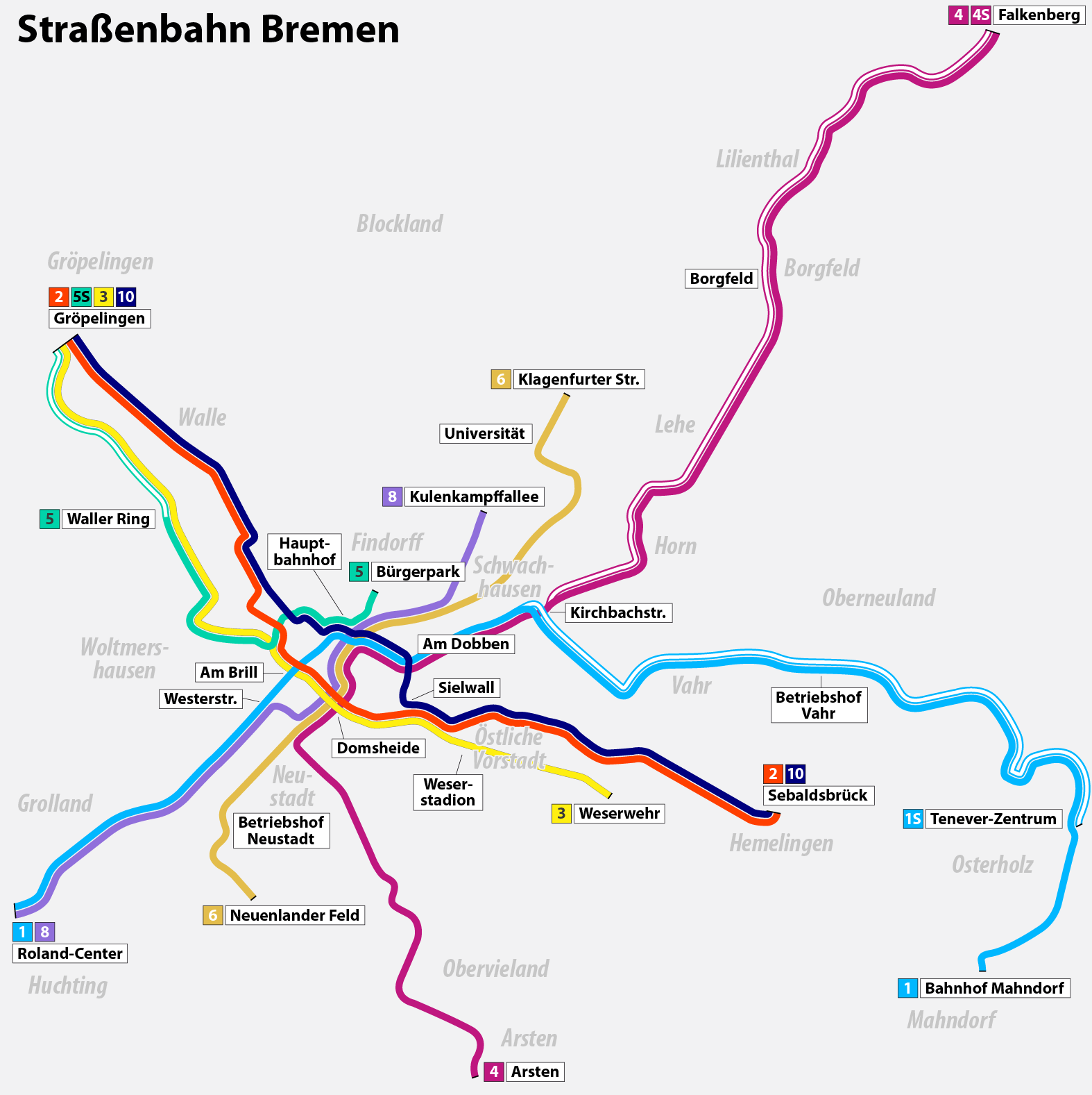 Karte der Straßenbahn Bremen: Liniennetz